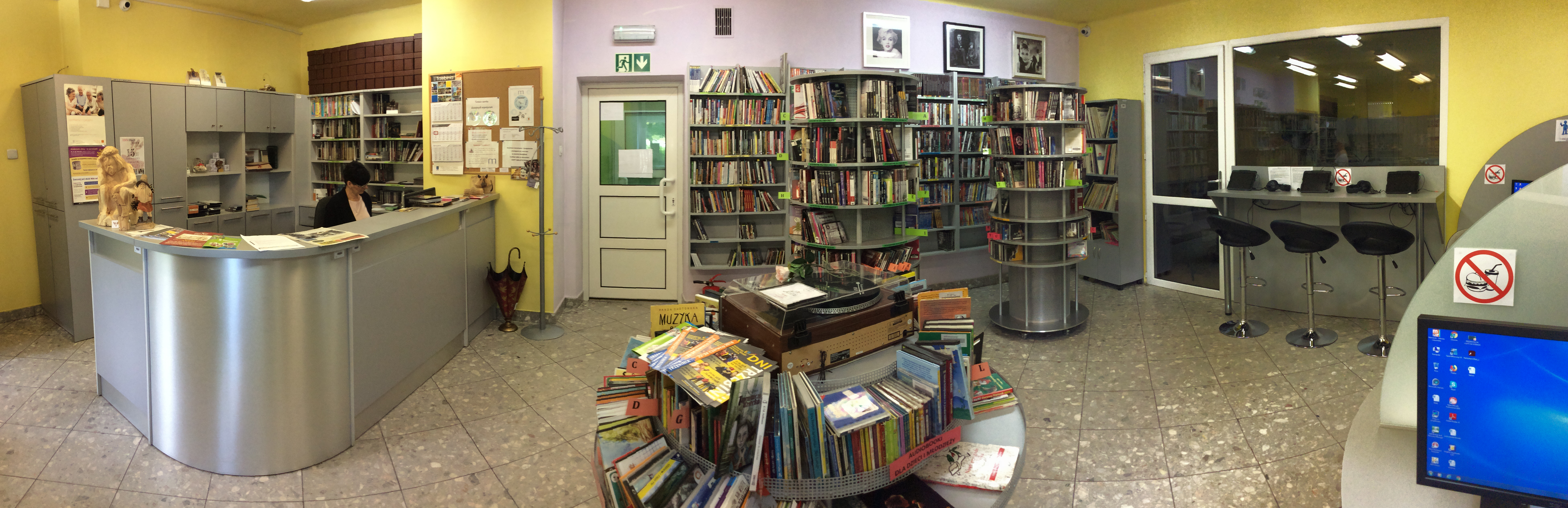 aktualizacja zdjęcia